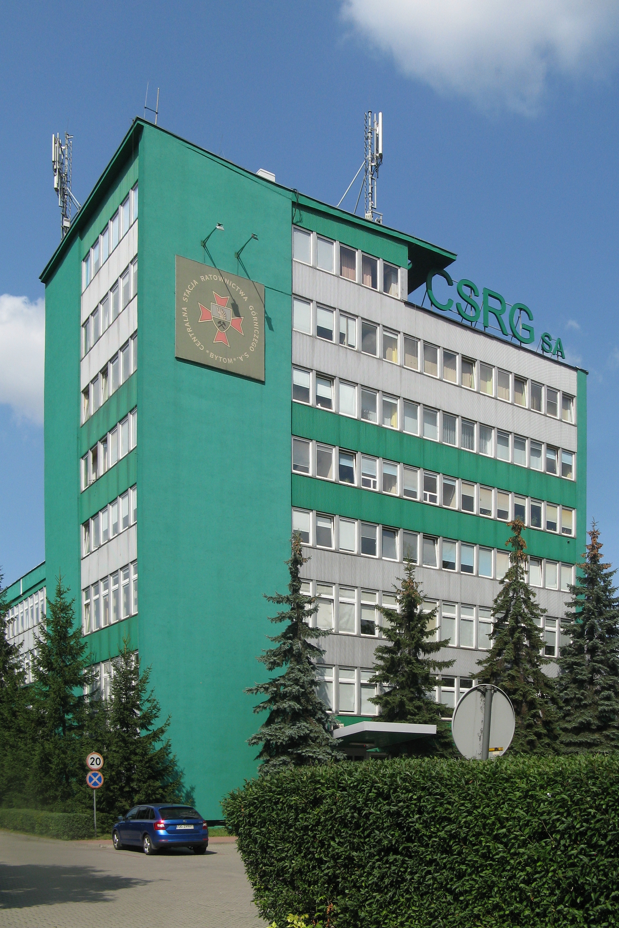 Centralna Stacja Ratownictwa Górniczego, siedziba przy ul. Chorzowskiej 25 w Bytomiu.